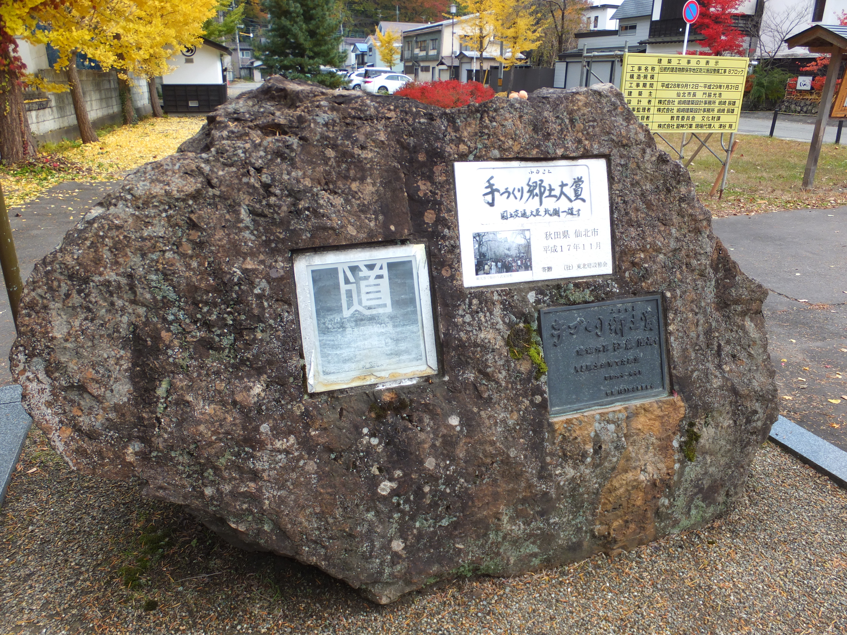 秋田県仙北市角館にある『日本の道100選』選定を記念する石碑。この他に2回の「手づくり郷土賞」受賞を記念するプレートがはめ込まれている。